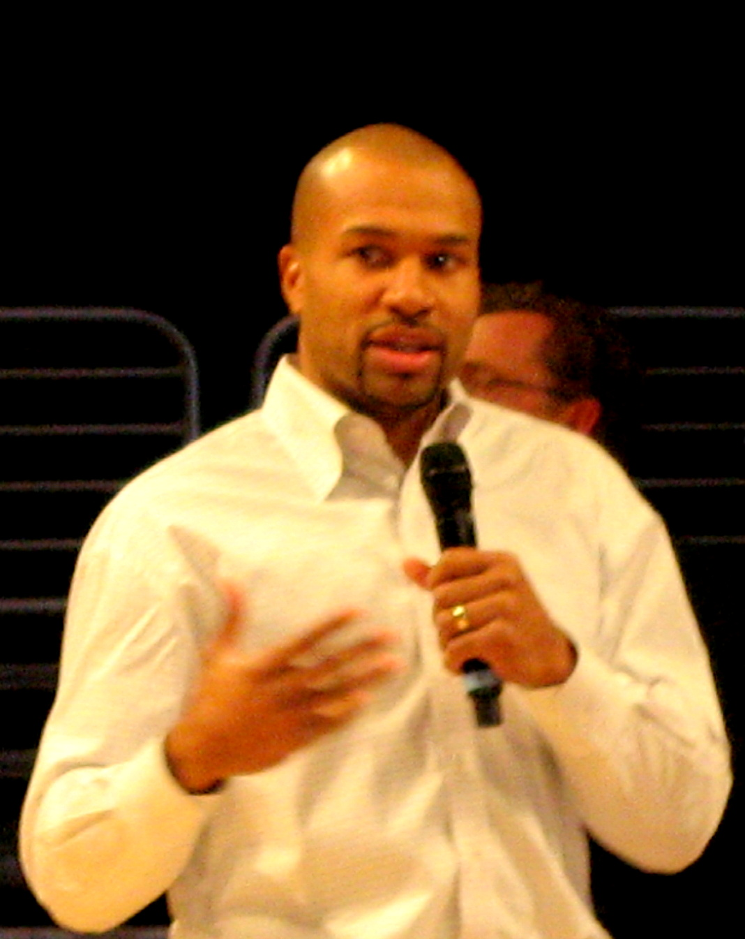 Derek Fisher in 2009.